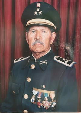 Guillermo Flores Reyes "El ultimo dorado de Villa"